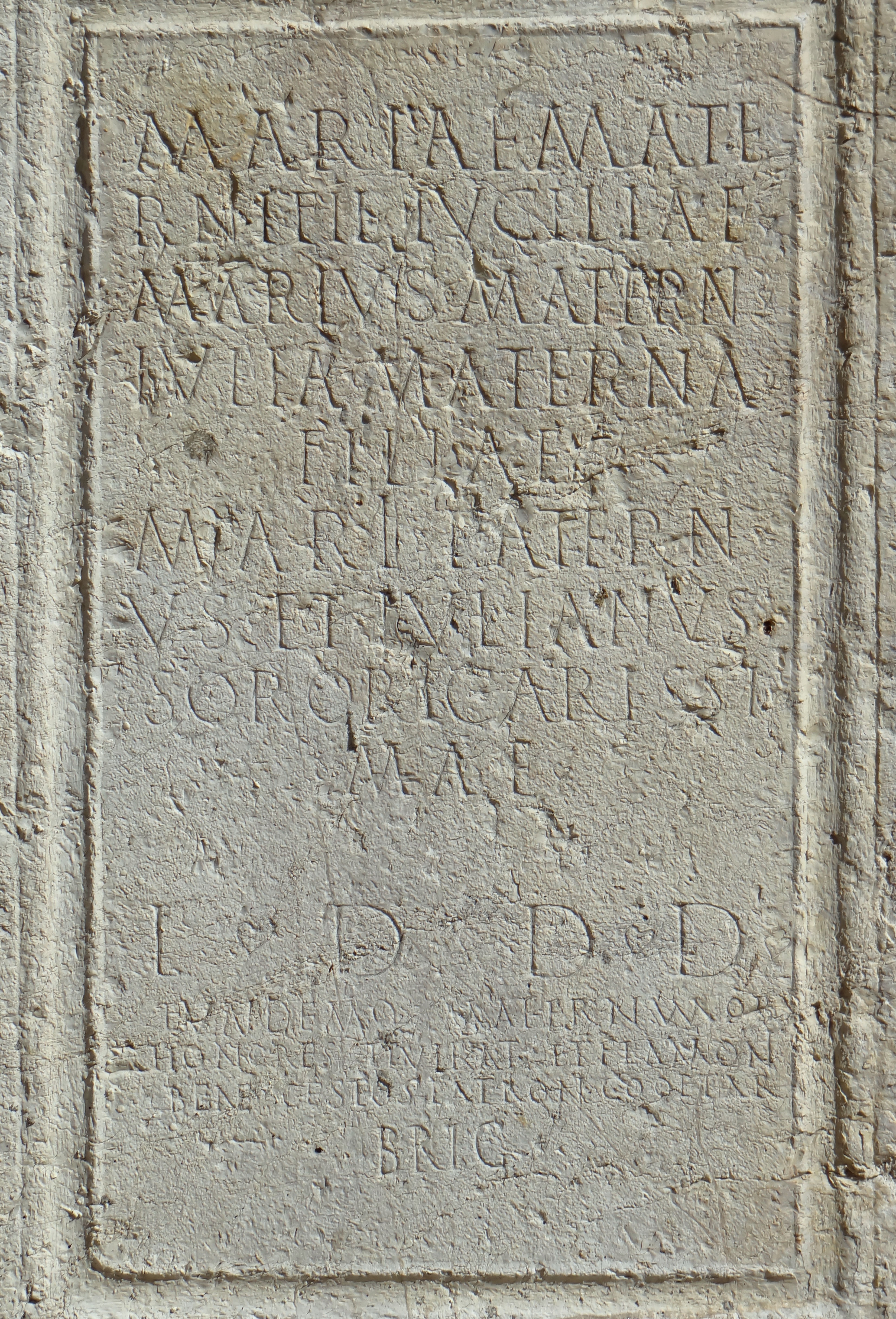 Briançonnet - Une pierre gravée romaine en face de la mairie